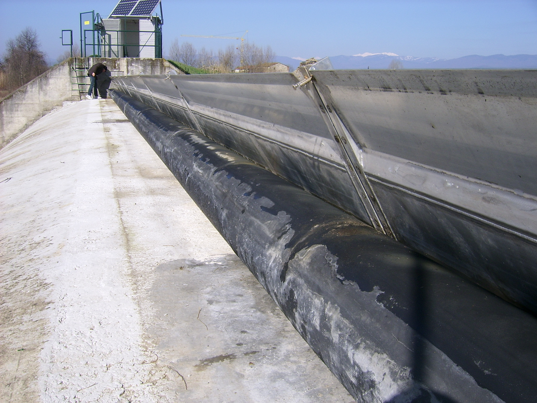 Si solleva in caso di portate di morbida nel torrente Ombrone